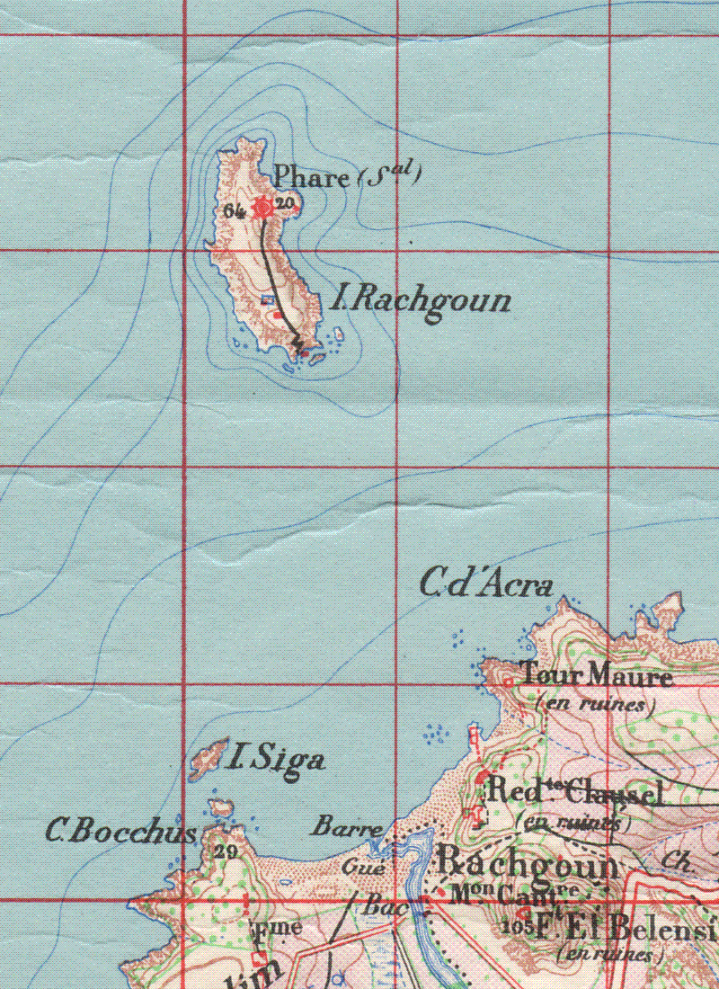 Béni-Saf, wilaya d'Aïn-Témouchent (Algérie) ; carte topographique de la plage et de l'île de Rachgoun (chaque carré rouge a un kilomètre de côté). Carte de 1889 révisée 1938.